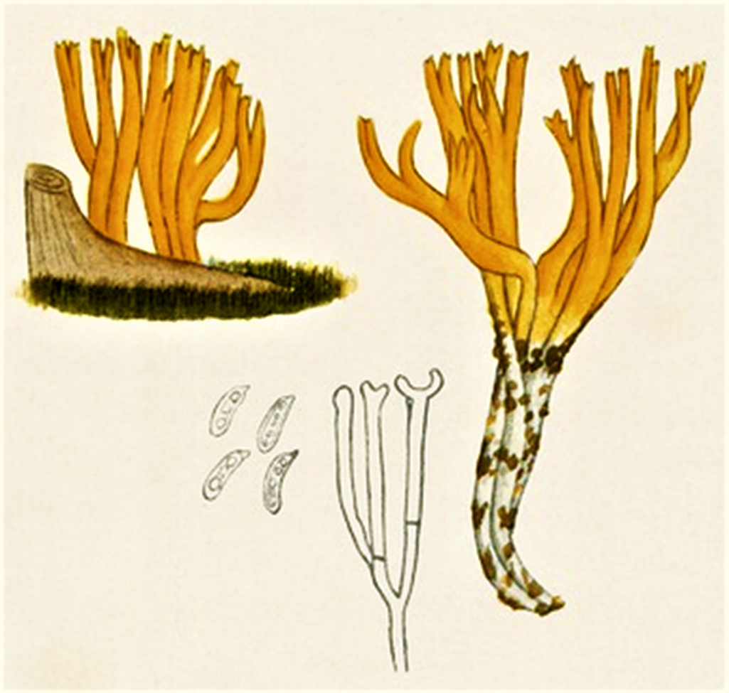 Giacomo Bresadola: Calocera viscosa (Pers., 1794) Fr.